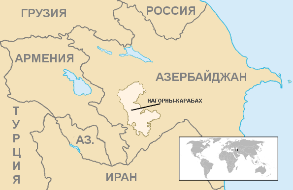 Месторасположение Арцаха